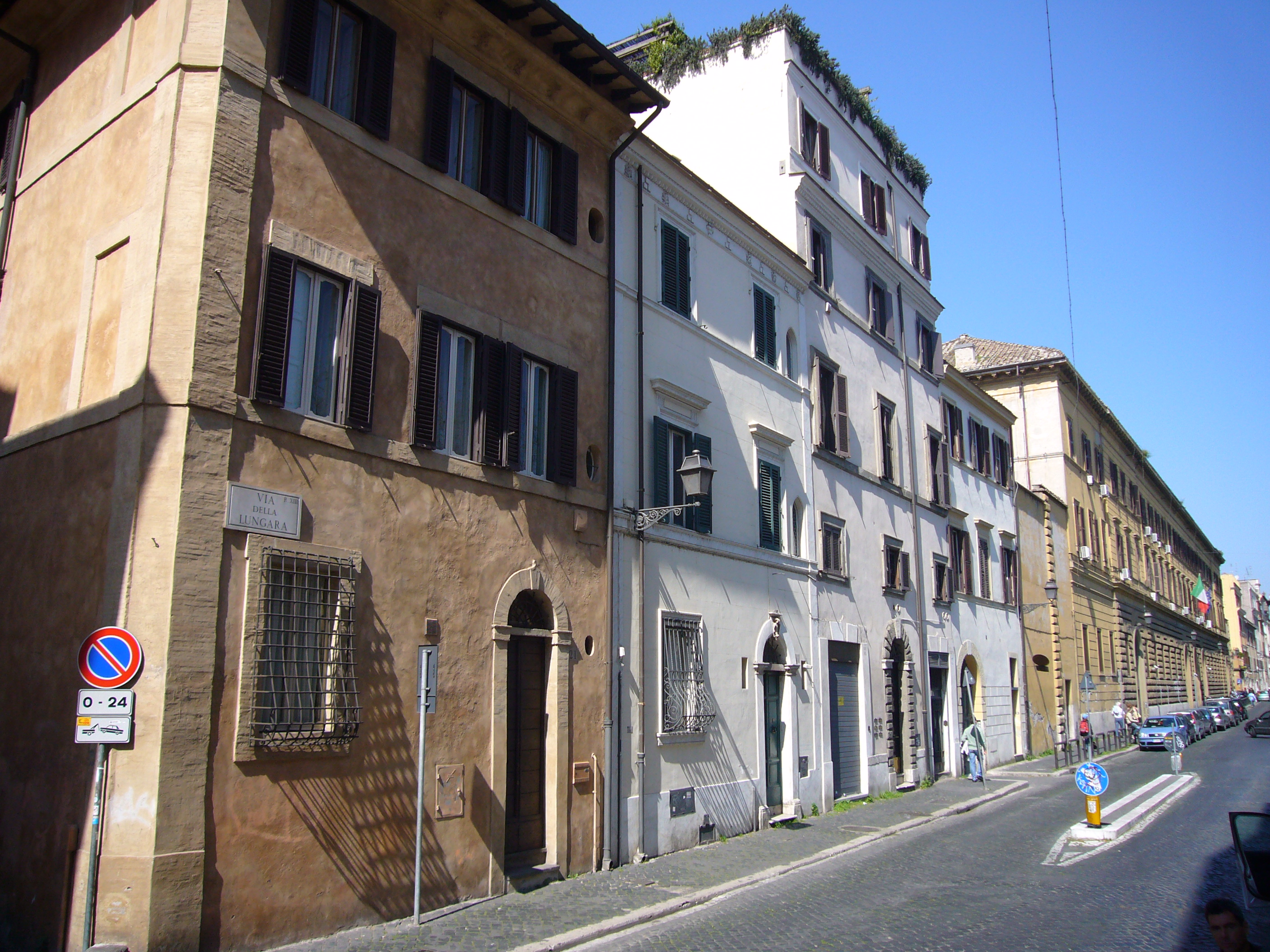 Roma, via della Lungara al Buon Pastore verso piazza della Rovere (angolo via s. Francesco di Sales). In fondo, il carcere di Regina Coeli